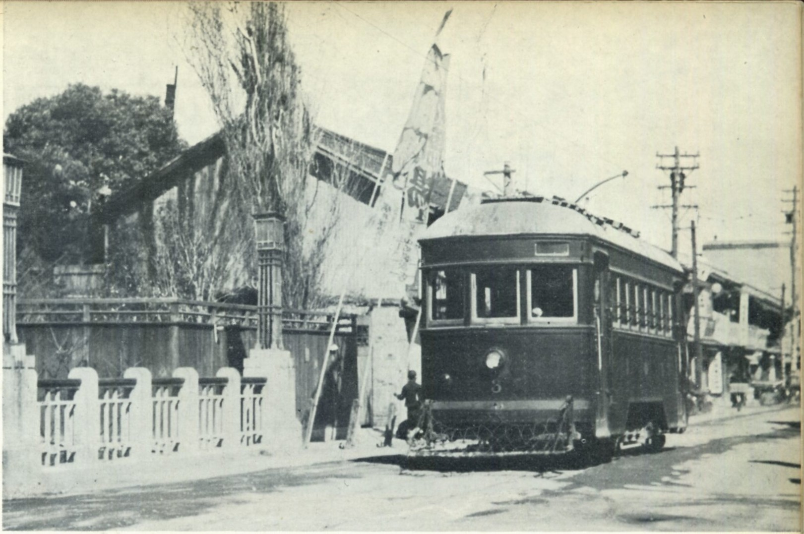 桑名電軌3号。昭和14年撮影。